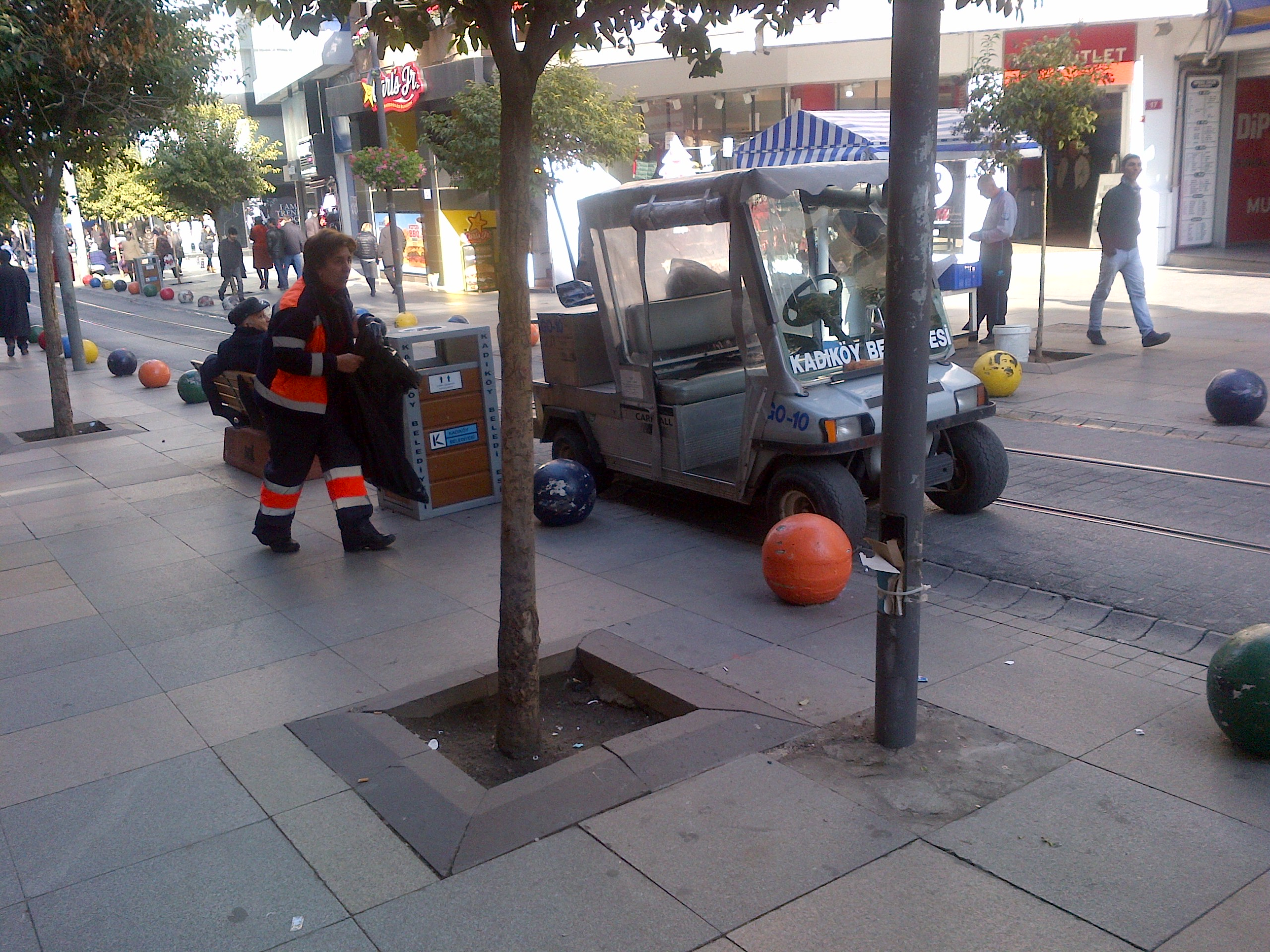 La avenida de Bahariye en Kadıköy es una de las zonas de prioridad para peatones. En la imagen una trabajadora municipal retira basura con un vehiculo electrico.